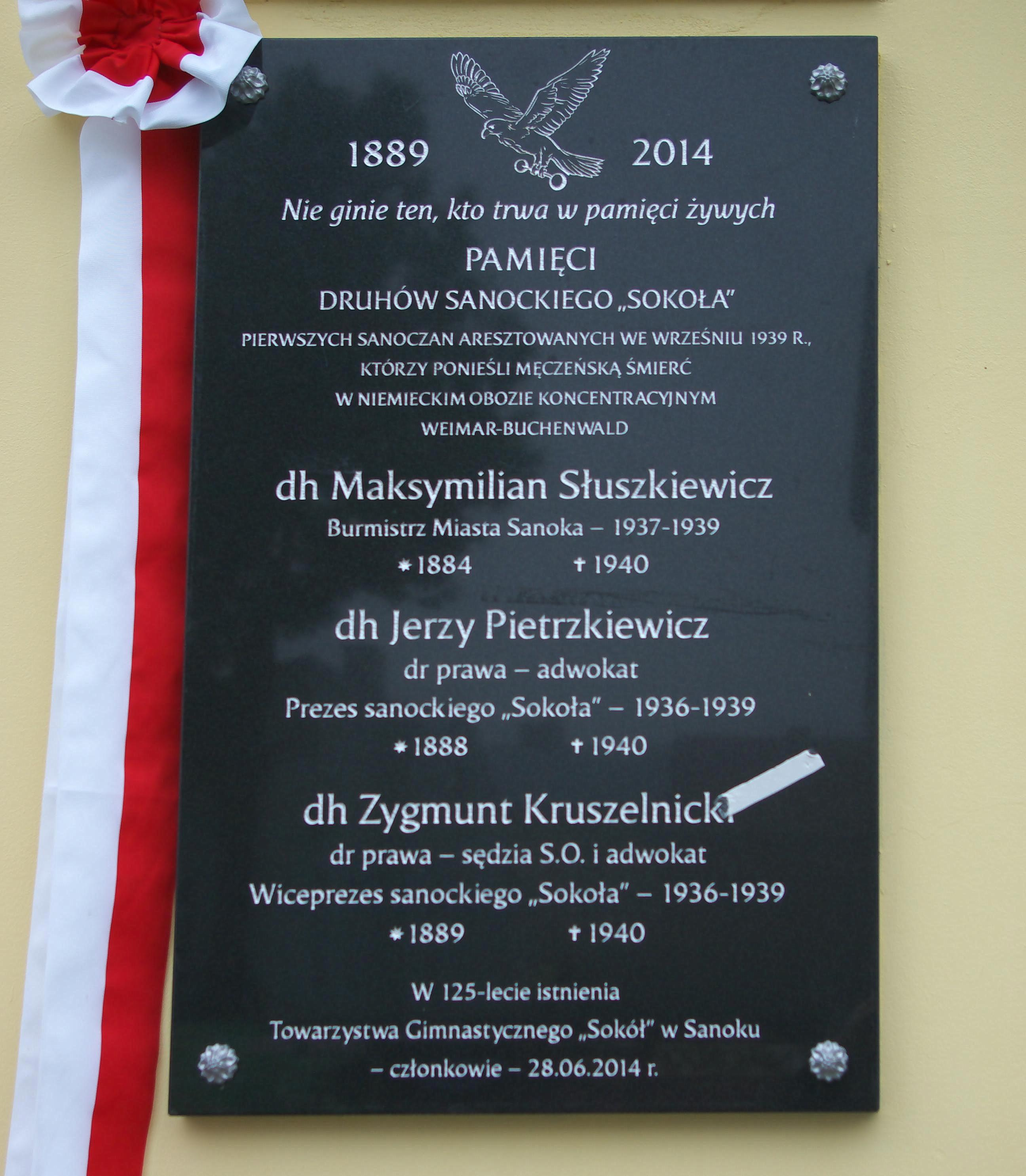 Uroczystości 125-lecia Towarzystwa Gimnastycznego „Sokół” w Sanoku na placu Harcerskim w Sanoku (7 czerwca 2014). W ramach uroczystości został odsłonięta tablica upamiętniająca trzech działaczy przedwojennego Sokoła w Sanoku, druhów: Jerzego Pietrzkiewicza (prezesa 1936-1939), Zygmunta Kruszelnickiego (wiceprezesa 1936-1939), Maksymiliana Słuszkiewicza.